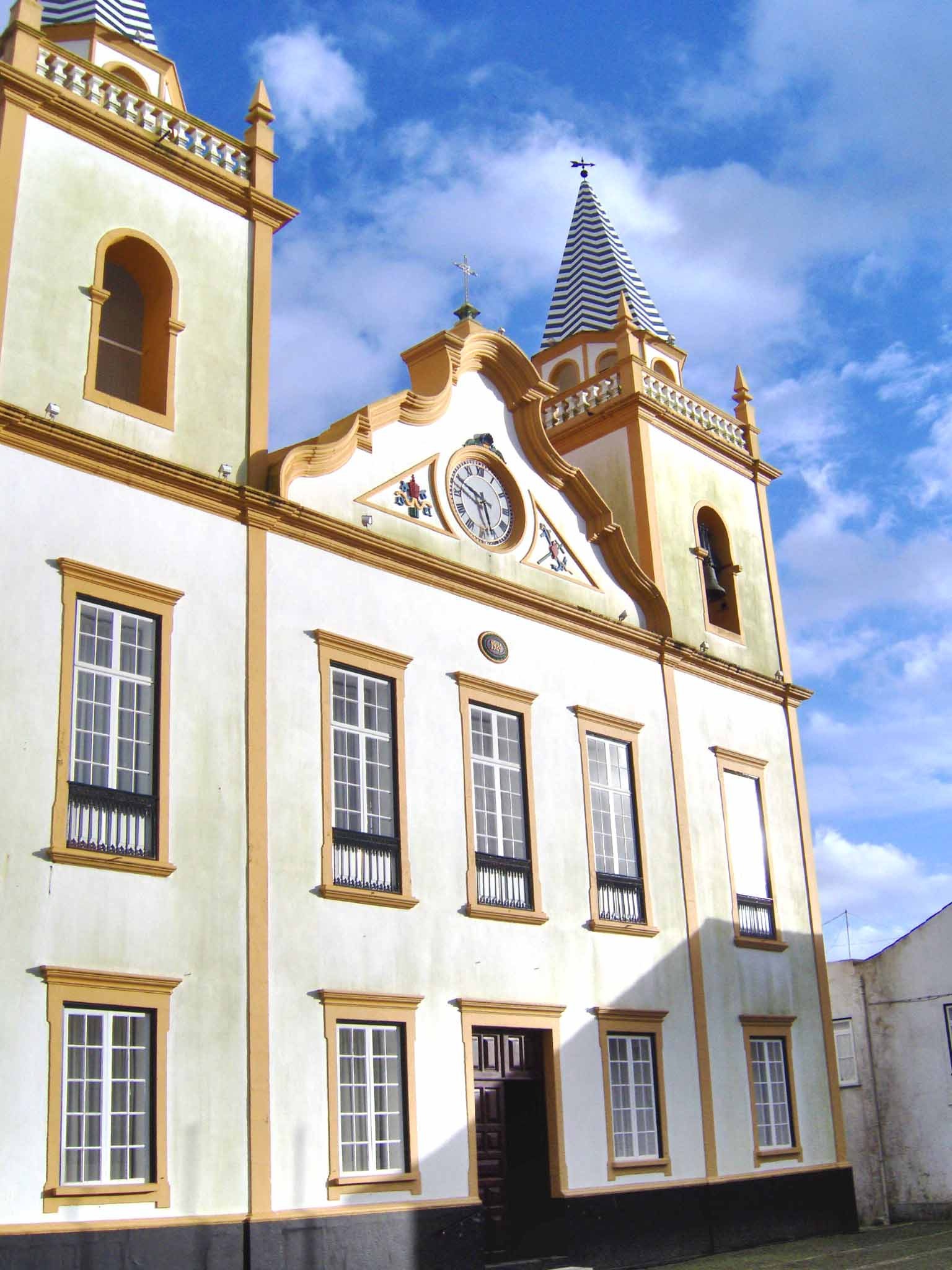 Igreja de São Pedro da Ribeirinha, ilha Terceira, Açores, Portugal